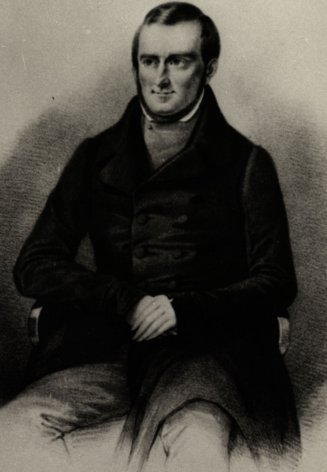 Bild Carl Friedrich Flemming (gestorben 1880)